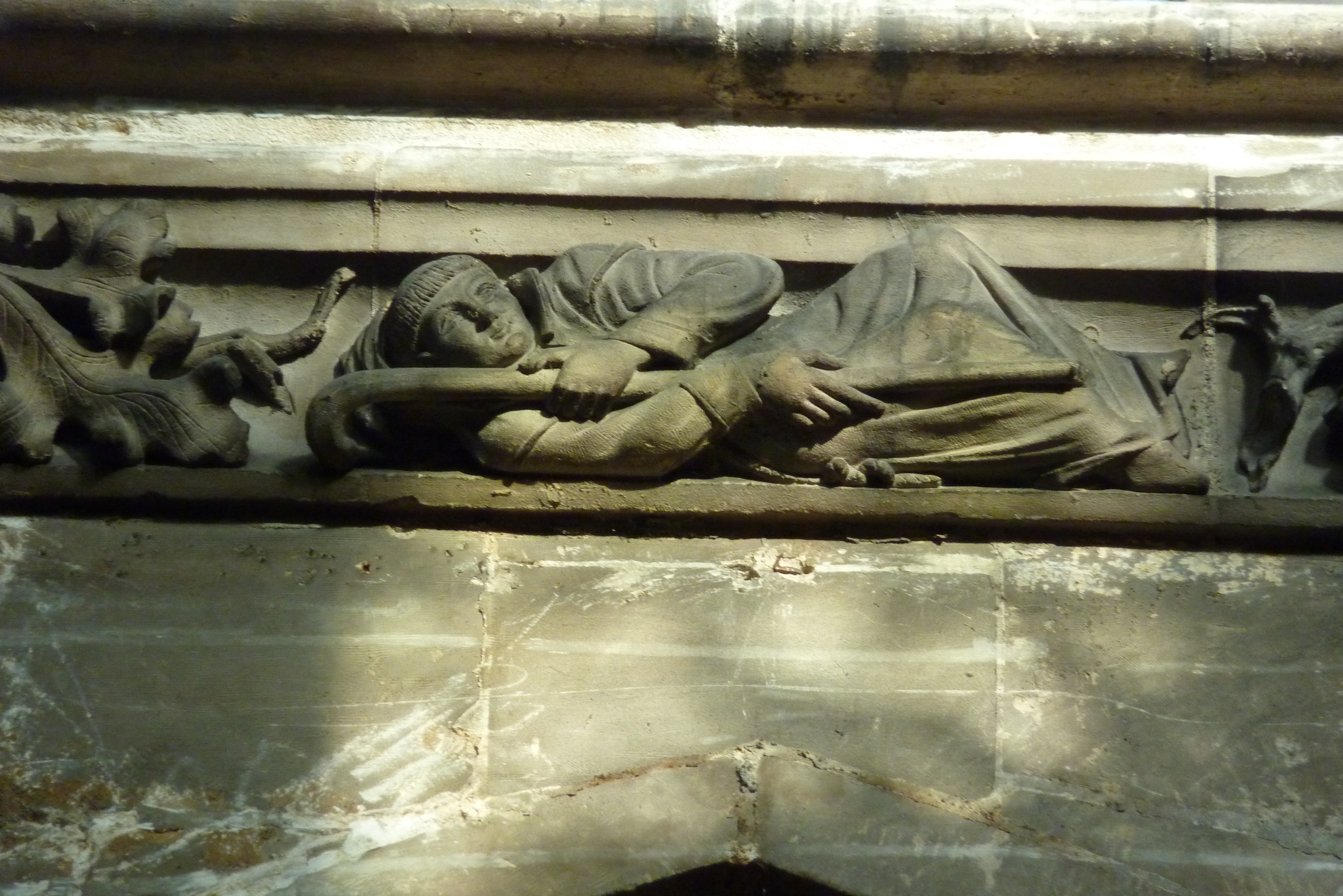 katholische Pfarrkirche Saint-Merry in Paris, Fries unterhalb der Fenster im Langhaus mit der Darstellung des hl. Medericus